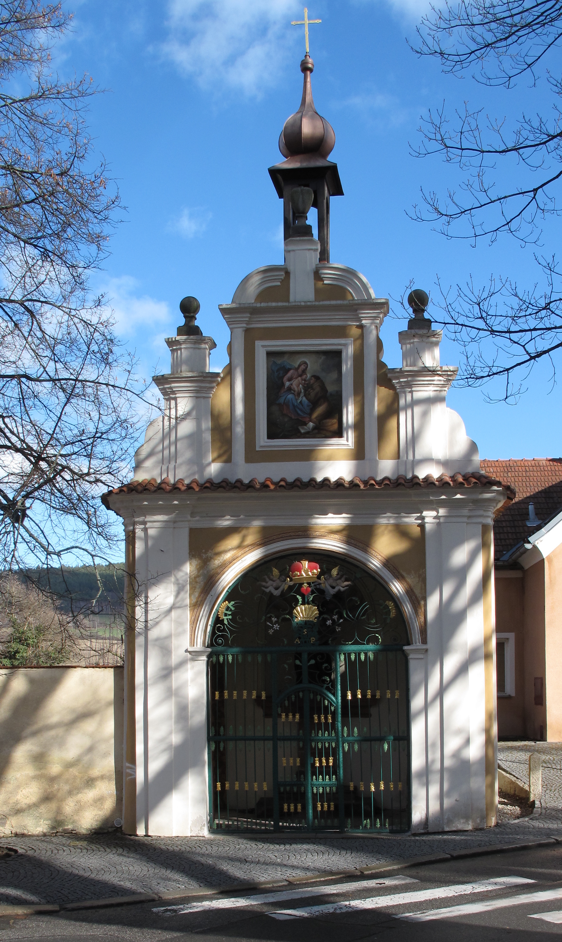 Kaple svatého Antotní Paduánského na Solní ulici v Prachaticích, Česká republika.